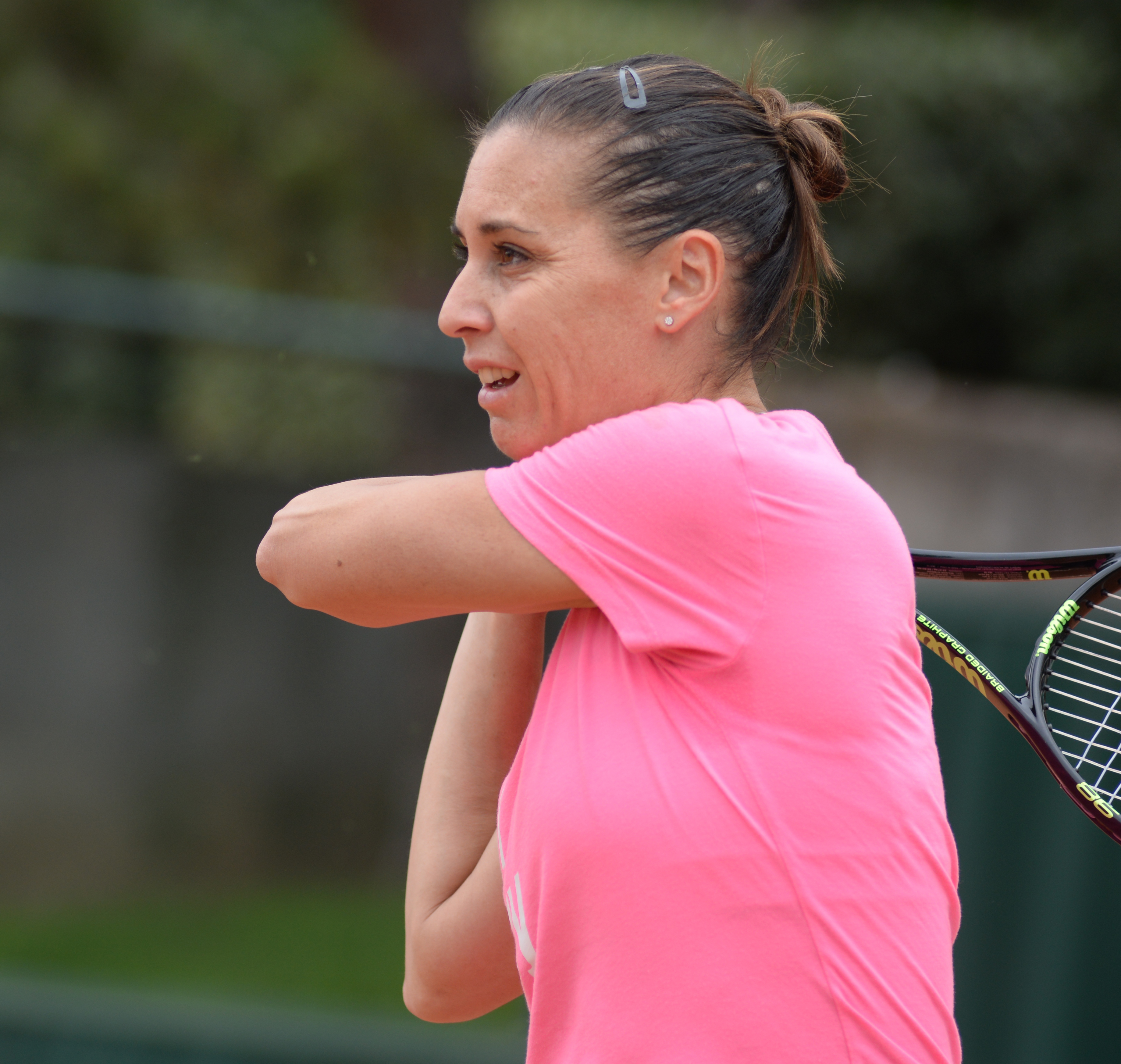 Flavia Pennetta